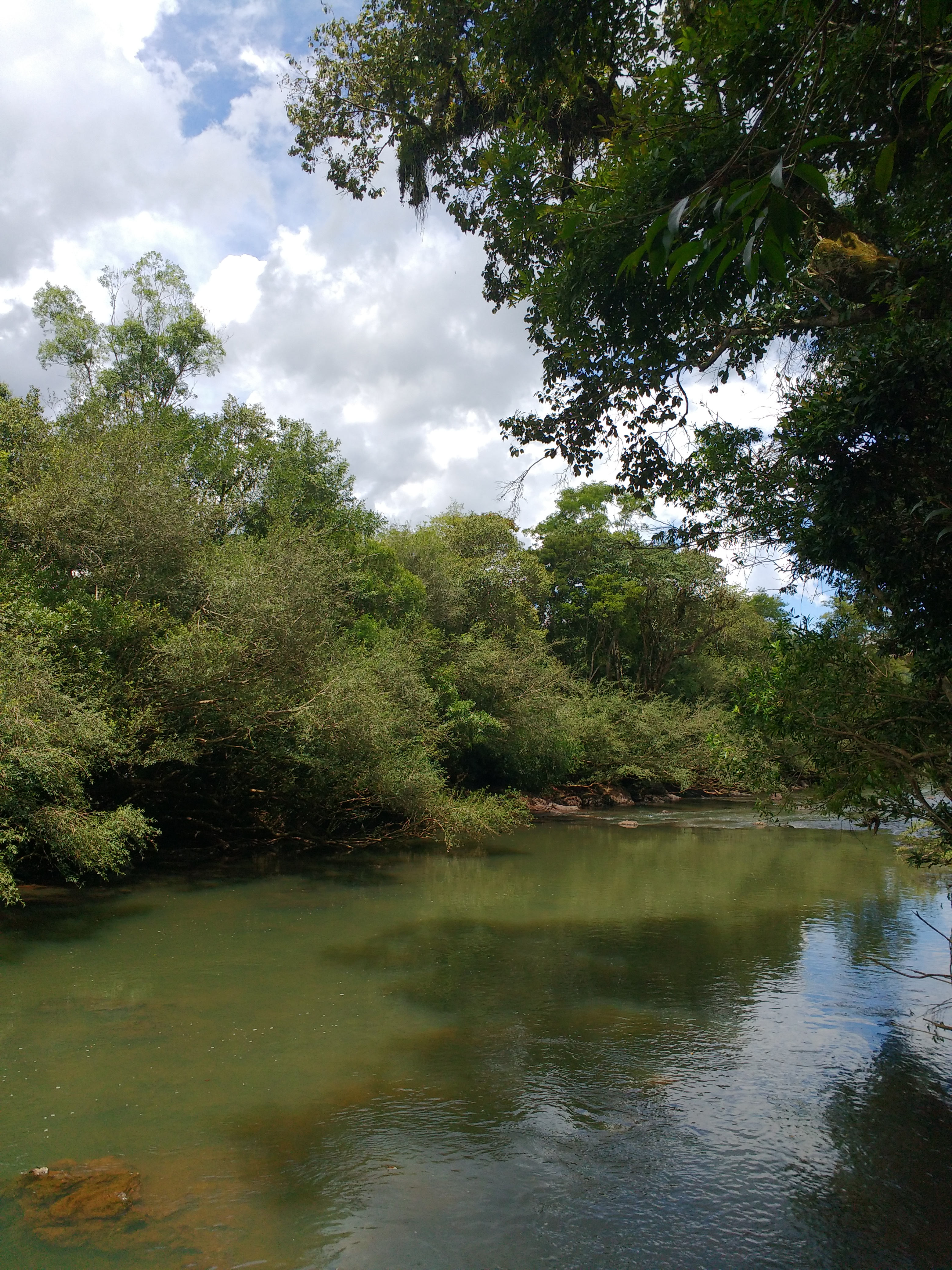 curso de agua dulce, selva misionera, Misiones, Argentina.